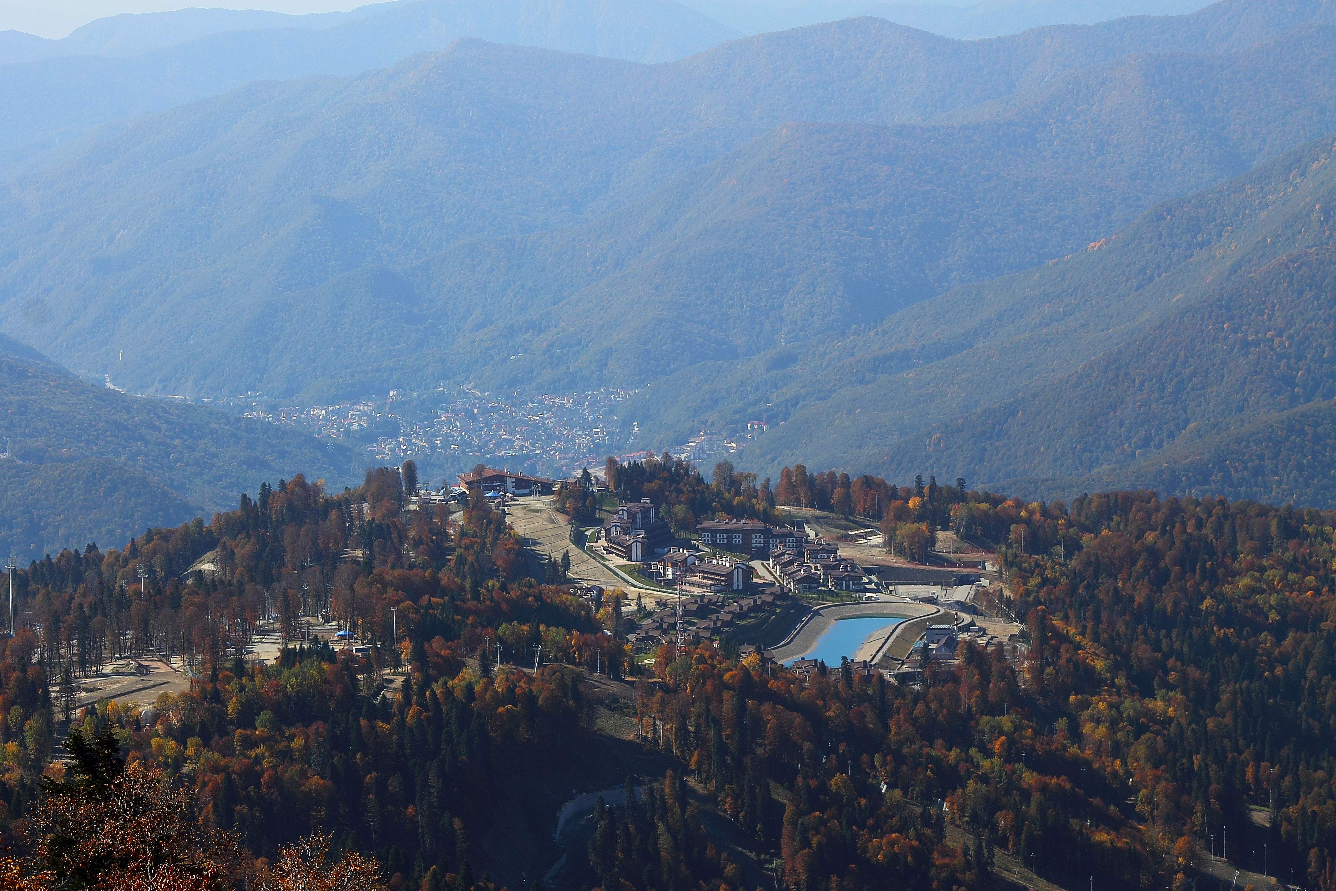 Вид на горную олимпийскую деревню на хребте Псехако. На заднем плане - Красная Поляна.